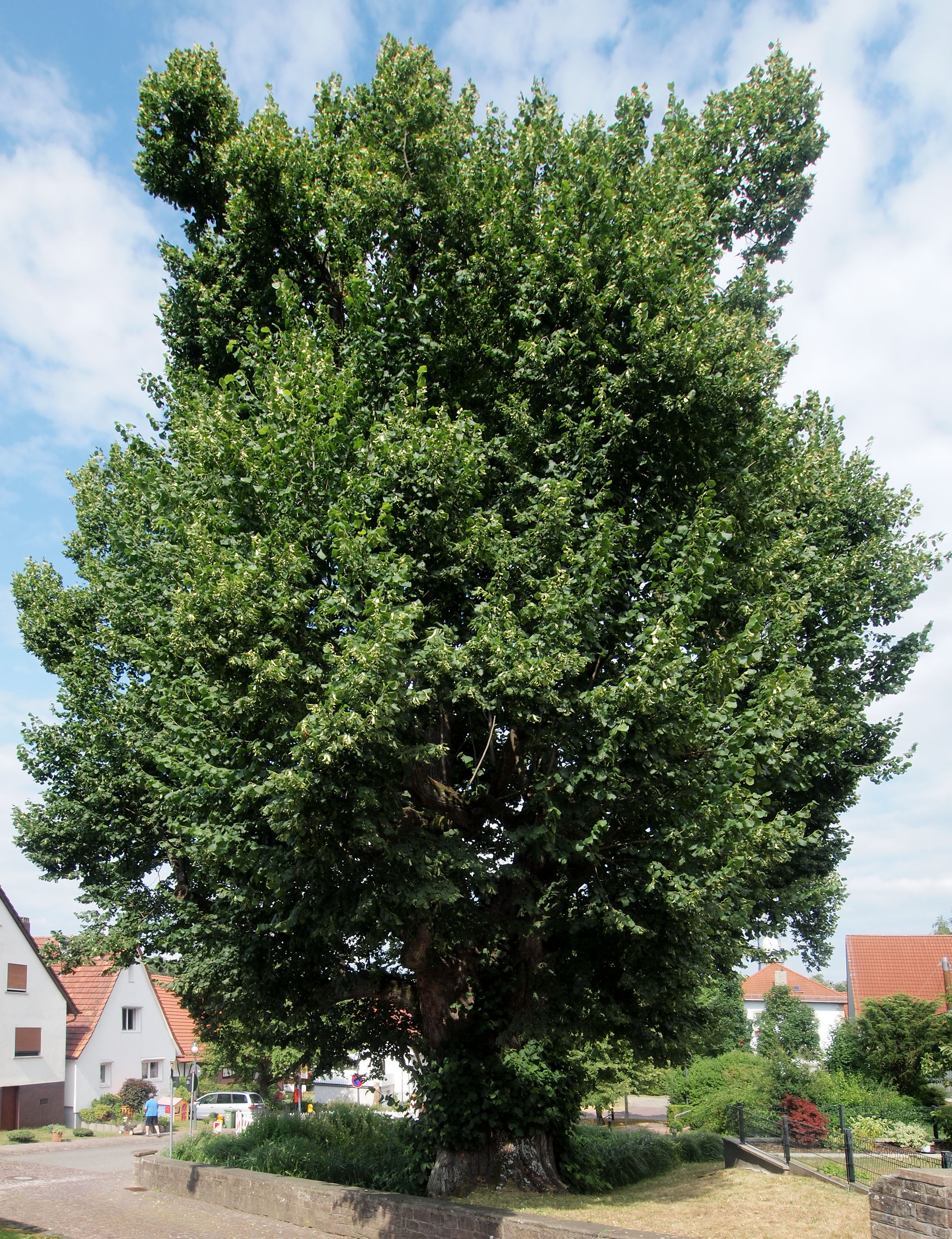 Die Linde in Schluttenbach soll laut Tafel 937 gepflanzt worden sein.